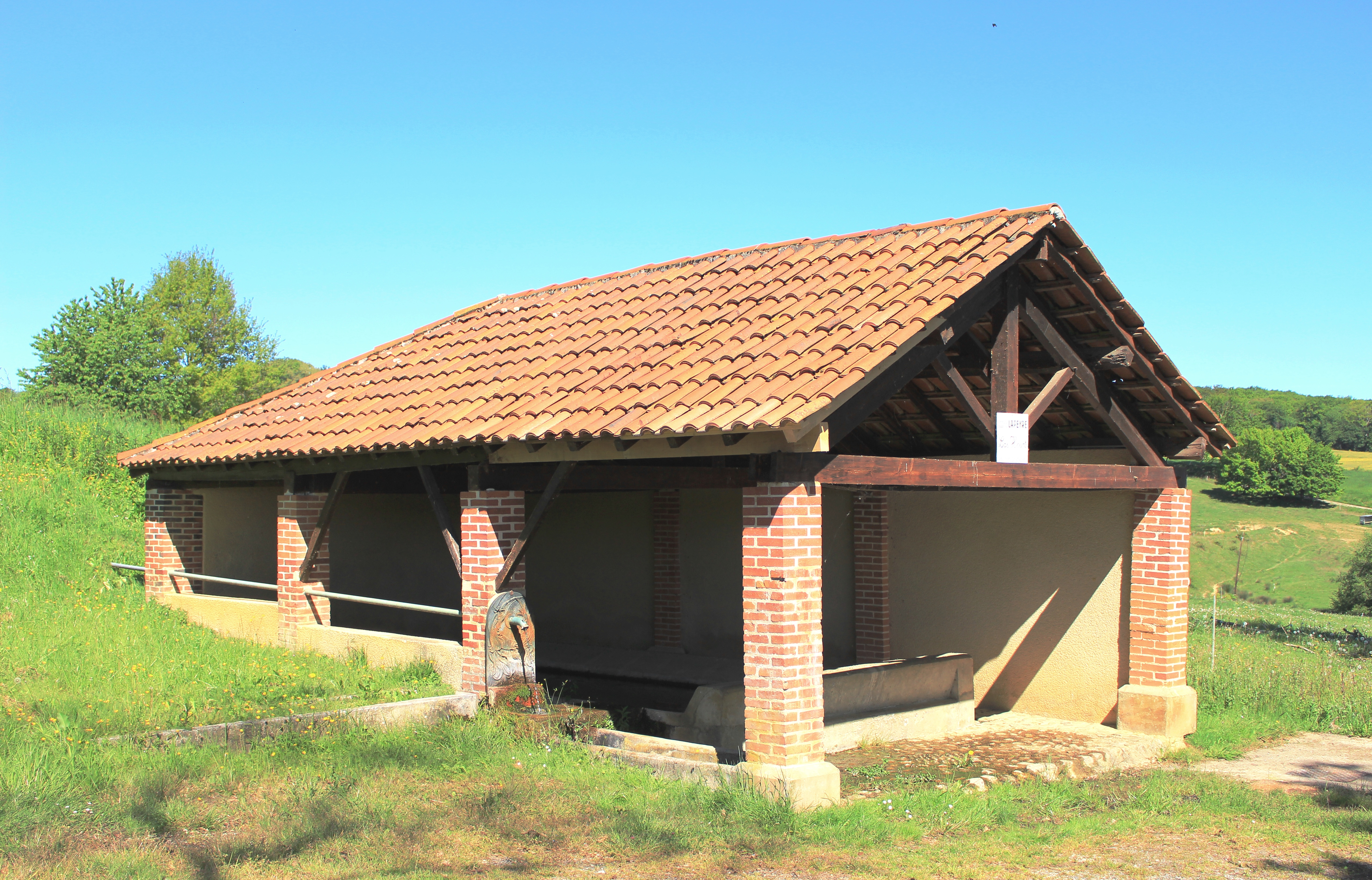 Lavoir de Lapeyre (Hautes-Pyrénées)